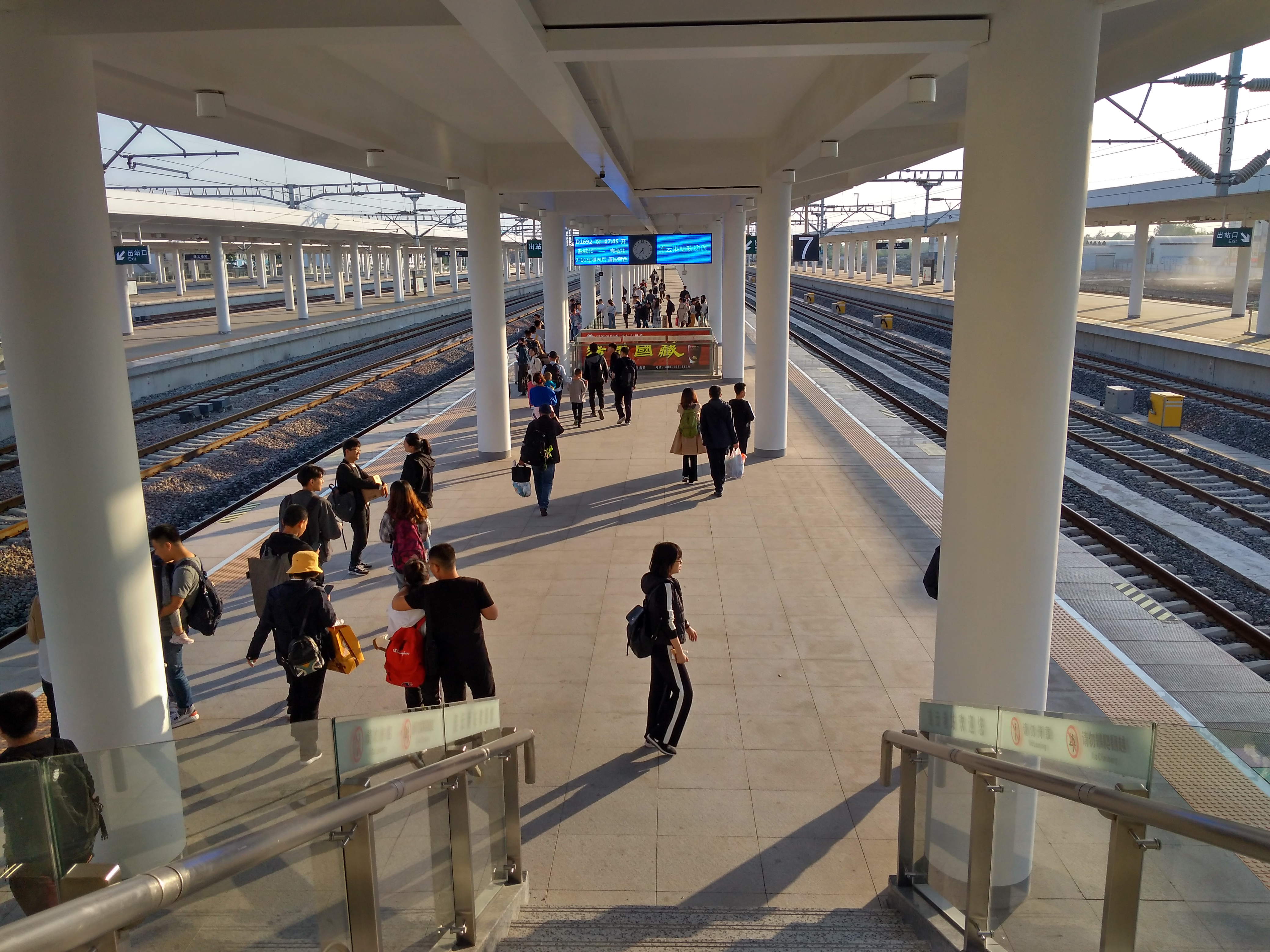 连云港站站台